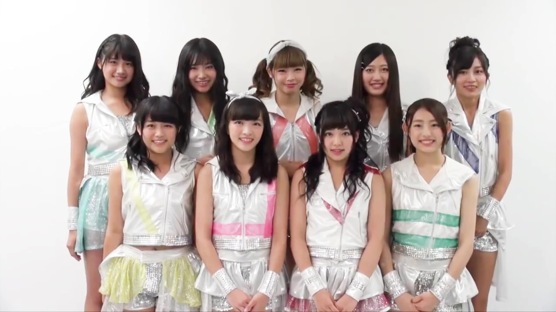 楽遊 vol.45号表紙【GEM】さんからのコメント！